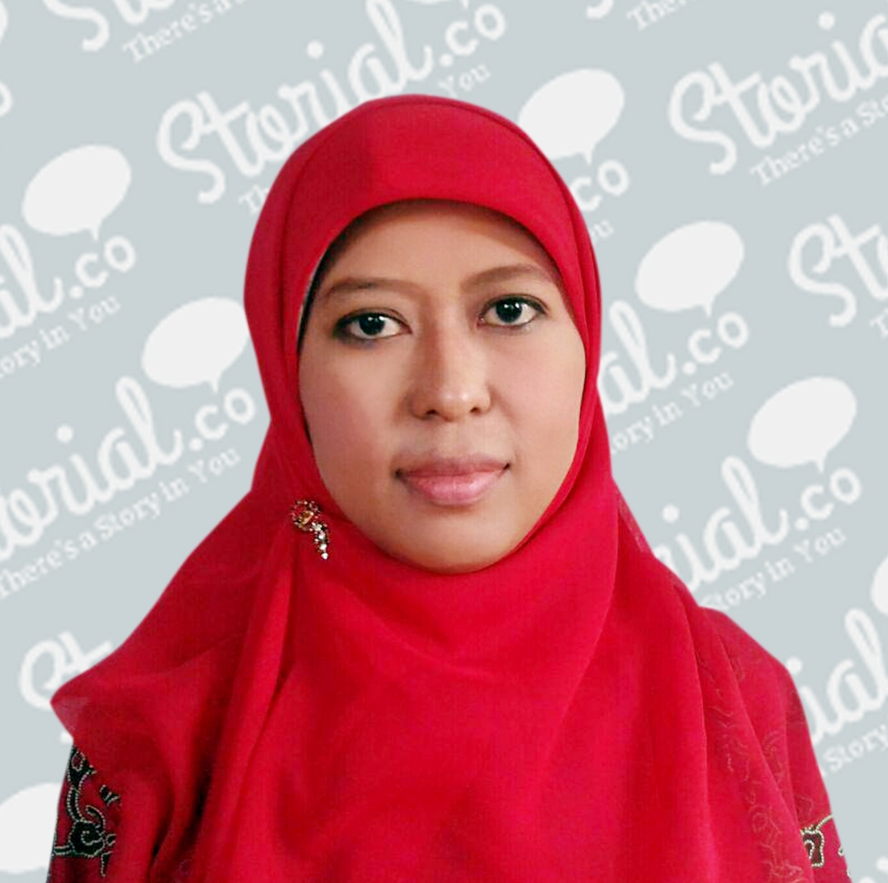 Siska Yuniati setelah menjadi narasumber acara televisi Sosialika yang ditayangkan di stasiun TVRI Yogyakarta.